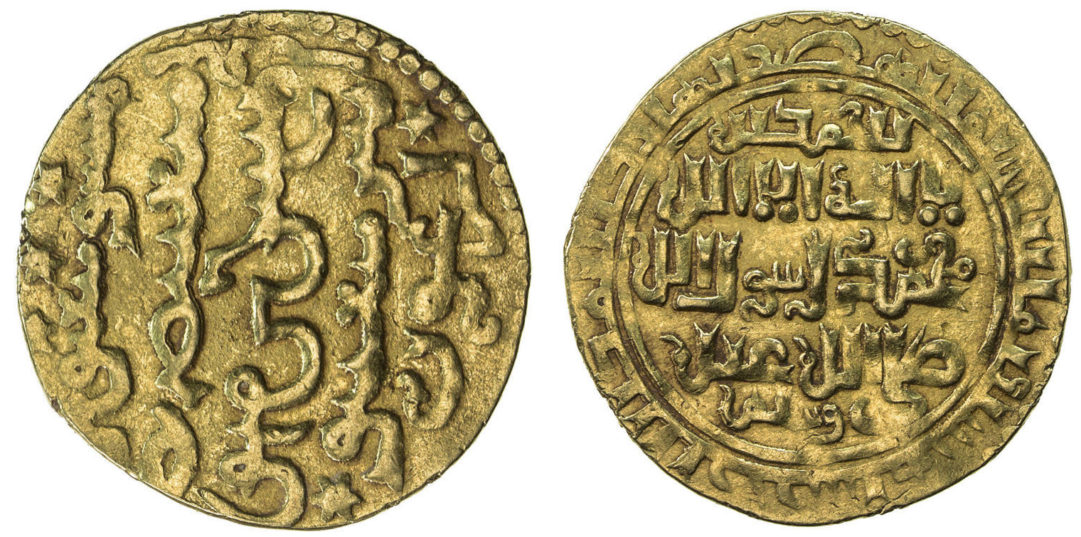 سکه یک دیناری ارغون خان ضرب تبریز با وزن ۴/۳۴ گرم بسال ۶۸۶ هجری قمری